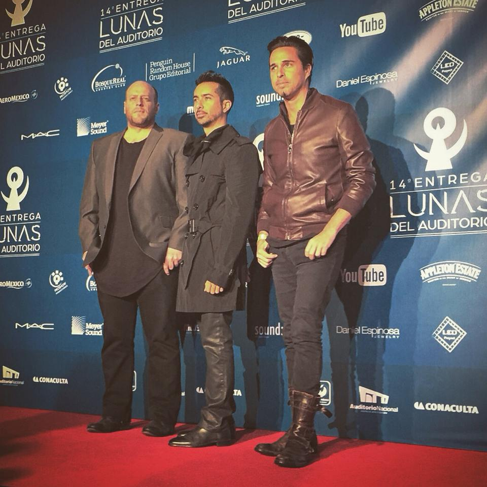 Jorge Soto (Izquierda), Alfonso Pichardo (Centro) y Alejandro "Midi" Ortega (Derecha) en la alfombra roja de Lunas del Auditorio en 2015